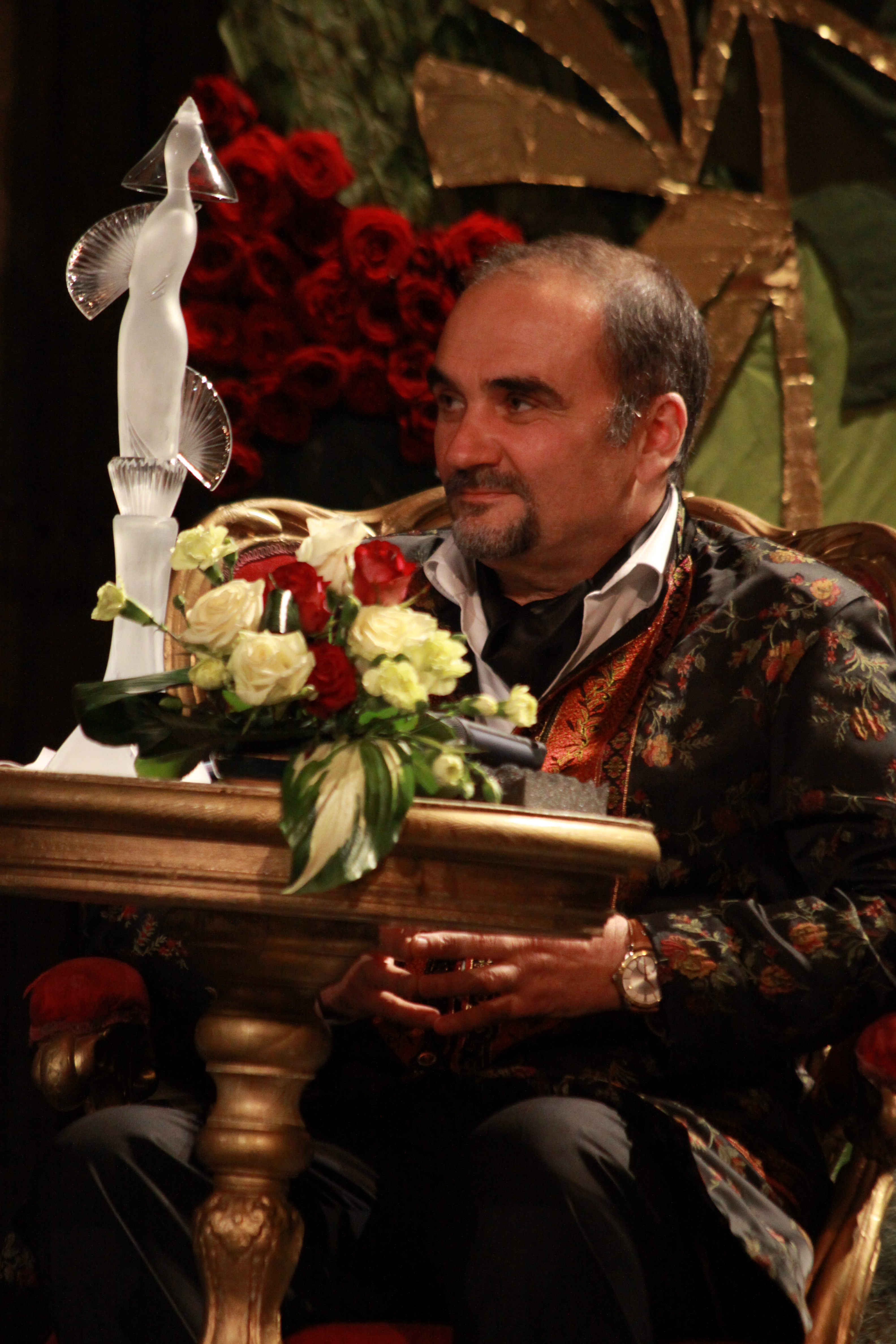 Борис Петрович Беленький на вручении премии "Хрустальная турандот" в 2010 г.